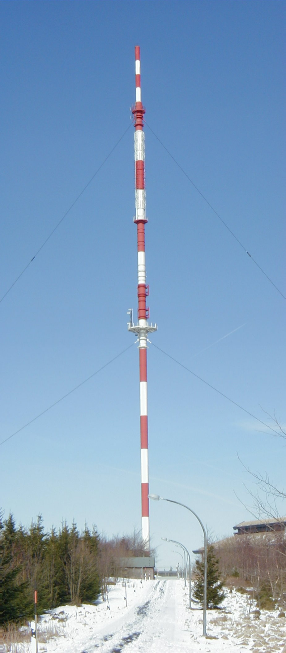 Sender Torfhaus 130m